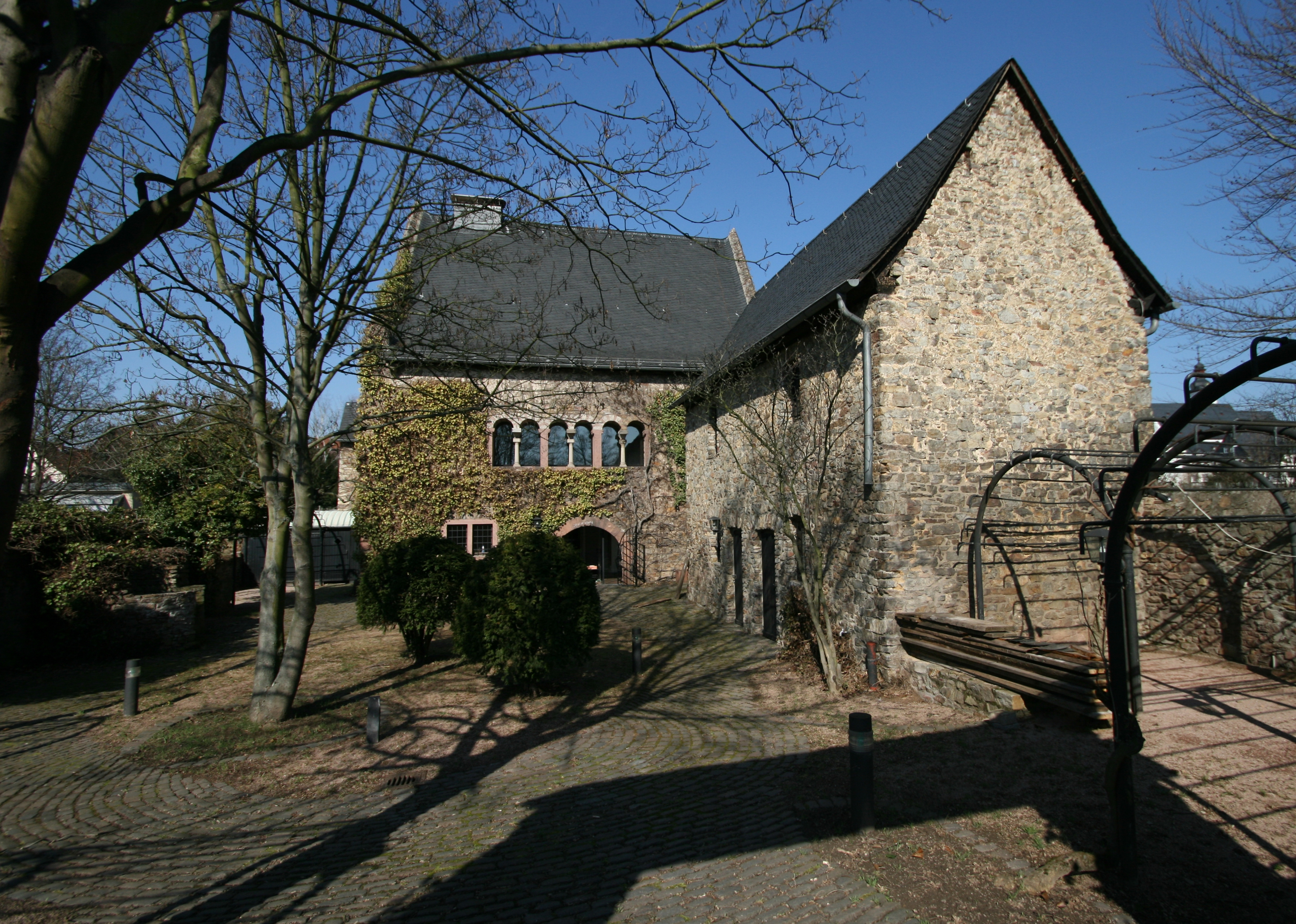 Das Graue Haus in Oestrich-Winkel stammt aus dem späten 11. Jahrhundert und zählt zu den ältesten Steinhäusern Deutschlands. Oestrich-Winkel, Rheingau, Hessen.